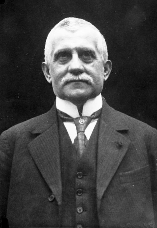 Der französische Sachverständige für die kommende Reparations-Conferenz Moreau, der Gouverneur der Bank von Frankreich ! Der Gouverneur der Bank von Frankreich, Moreau, der Sachverständige für die kommende Reparations-Conferenz